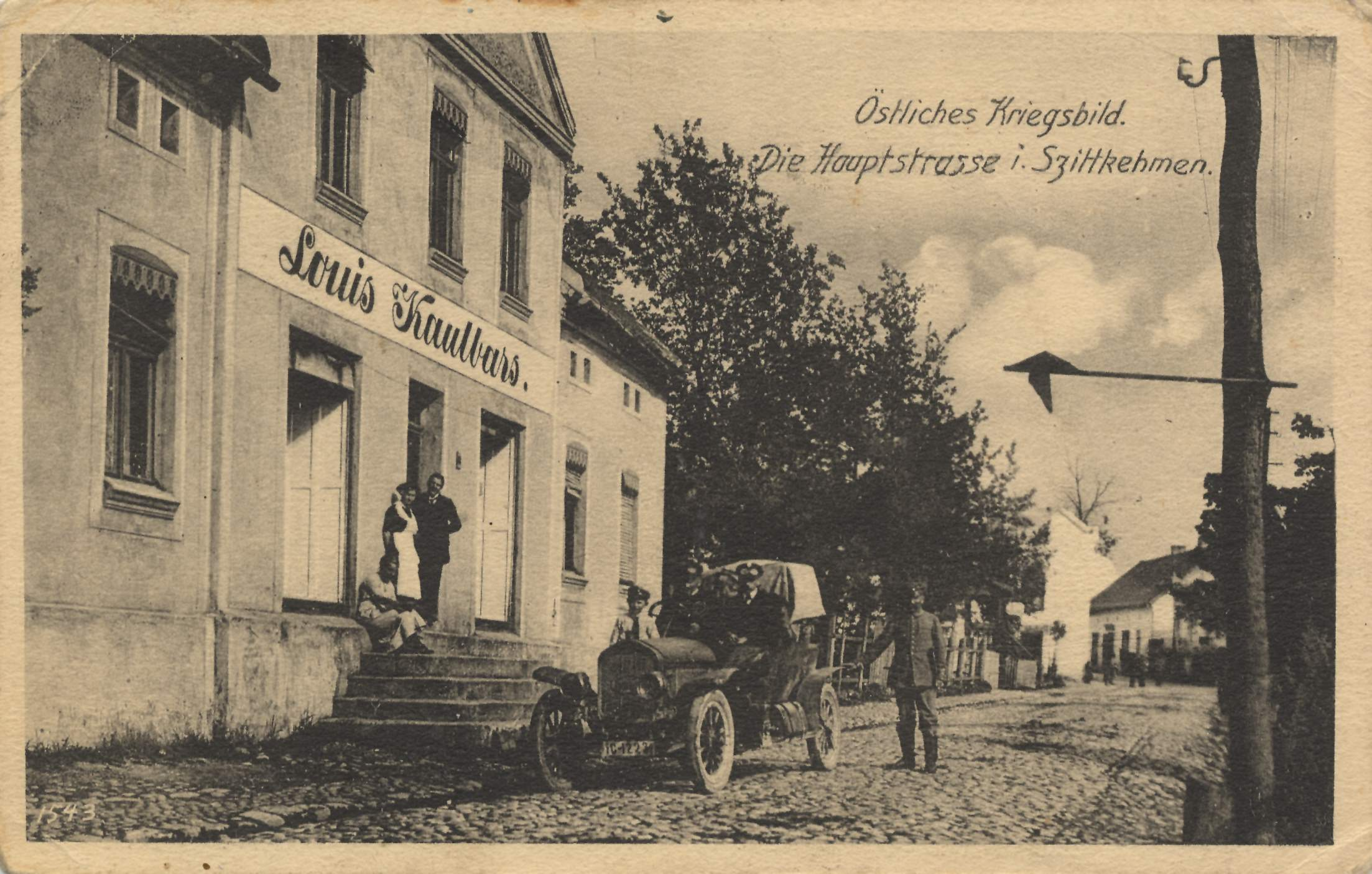 Hauptstraße